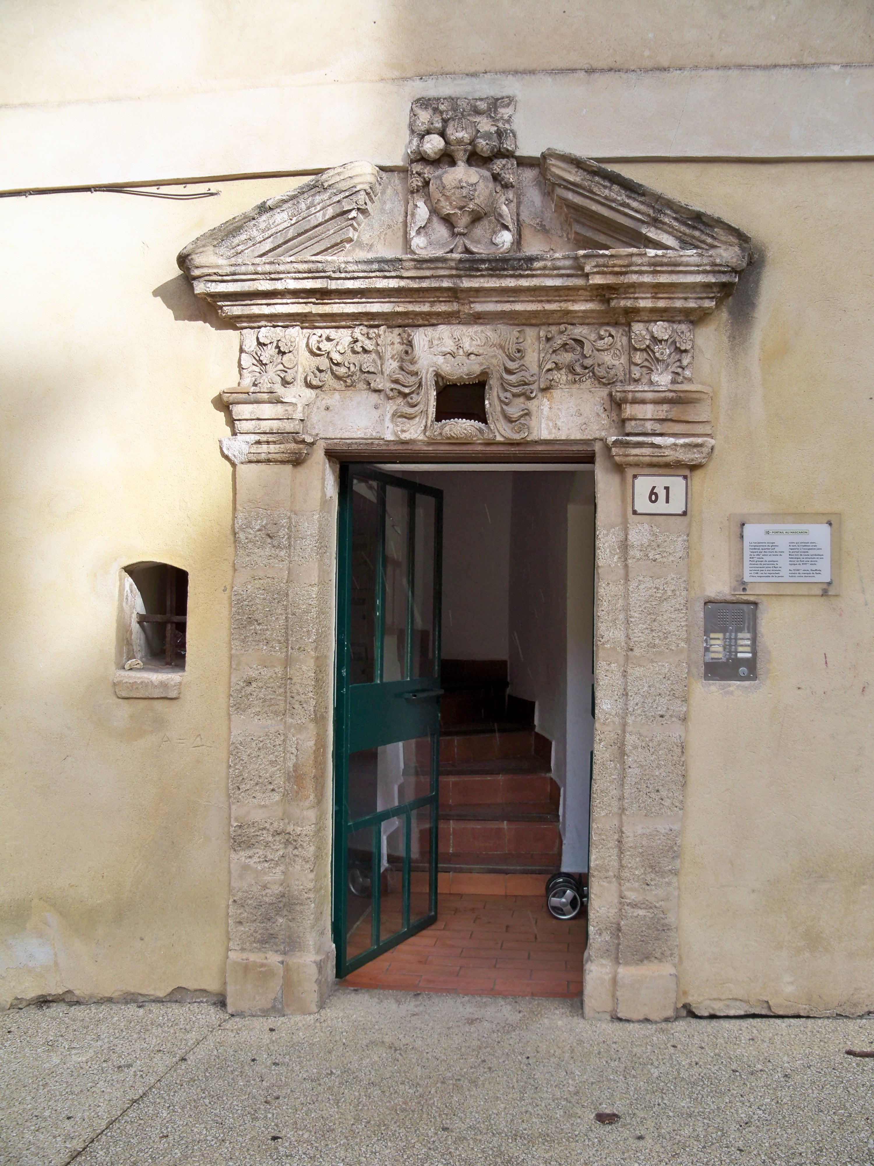 Portail au Mascaron, Porte de l'ancien hotel particulier de Maître Gauffridy, notaire du Marquis de Sade